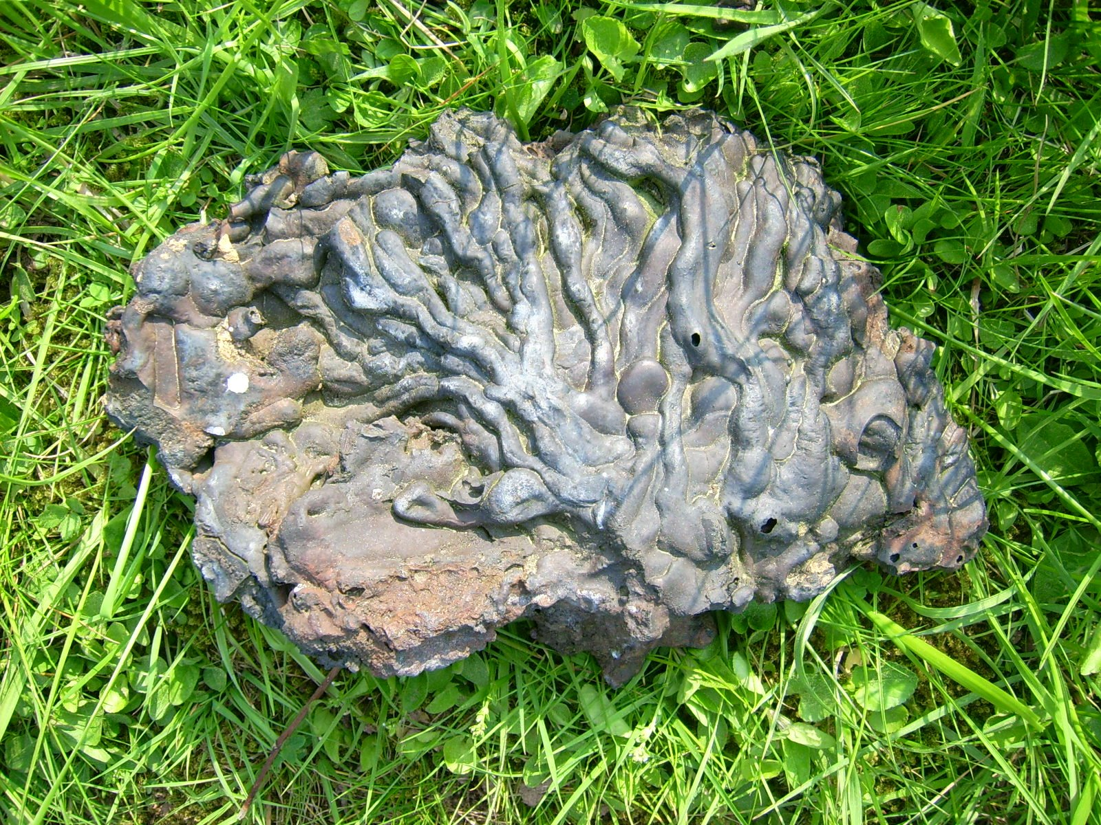 Rennofenschlacke aus dem Saarland